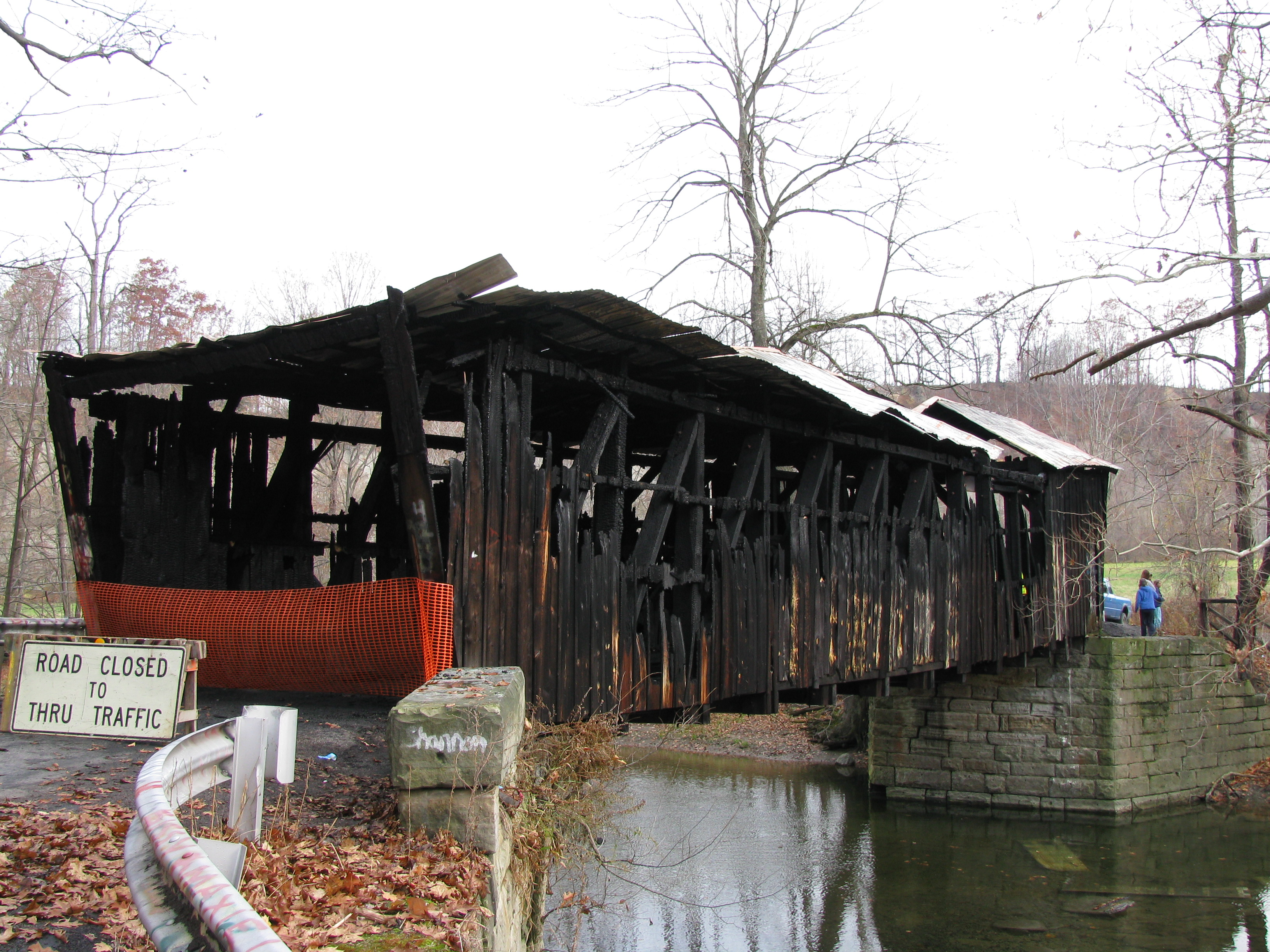 Gudgeonville Covered Bridge after destruction by arson.